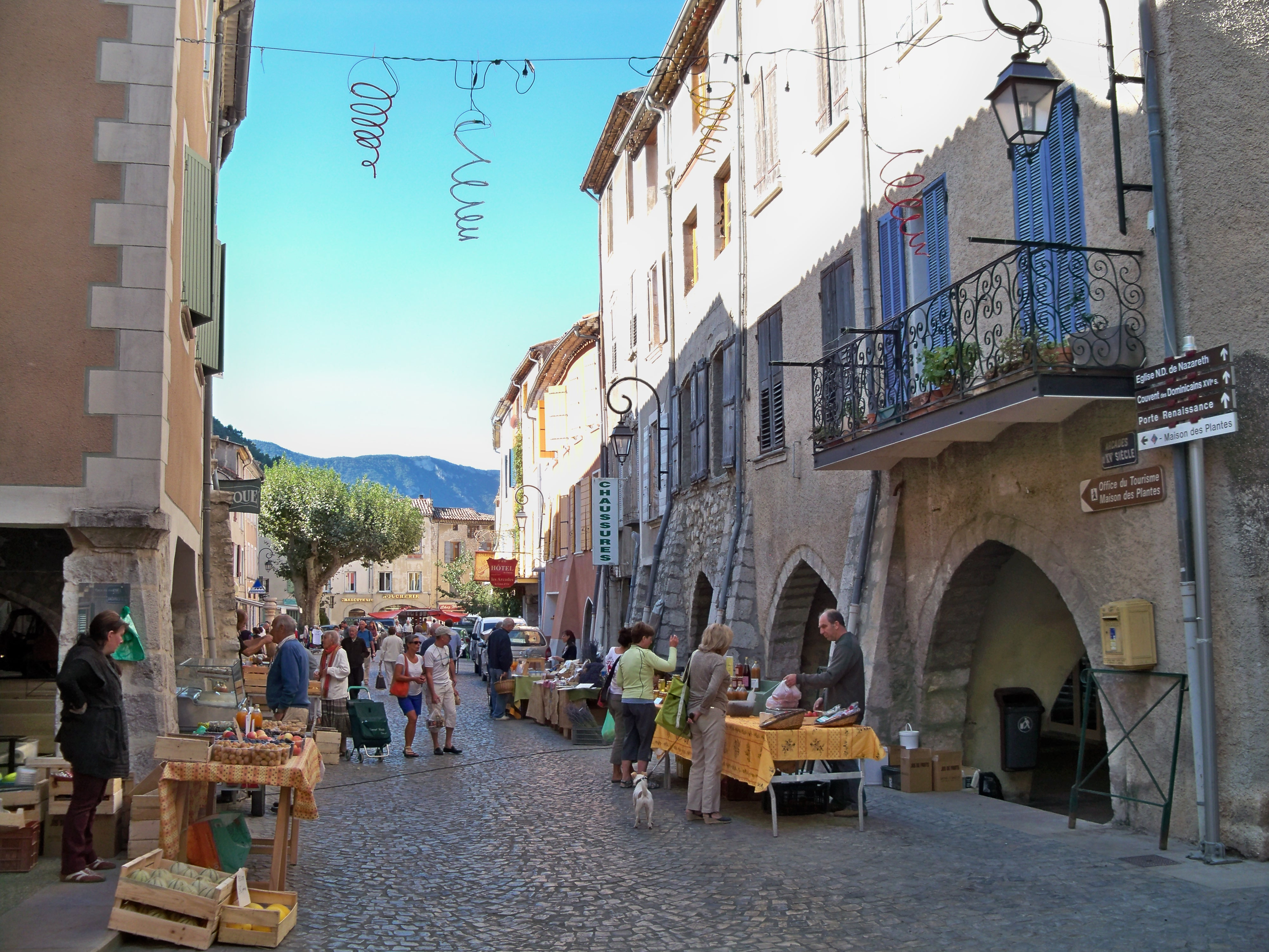 Place du Marché de Buis-les-Baronnies (26).